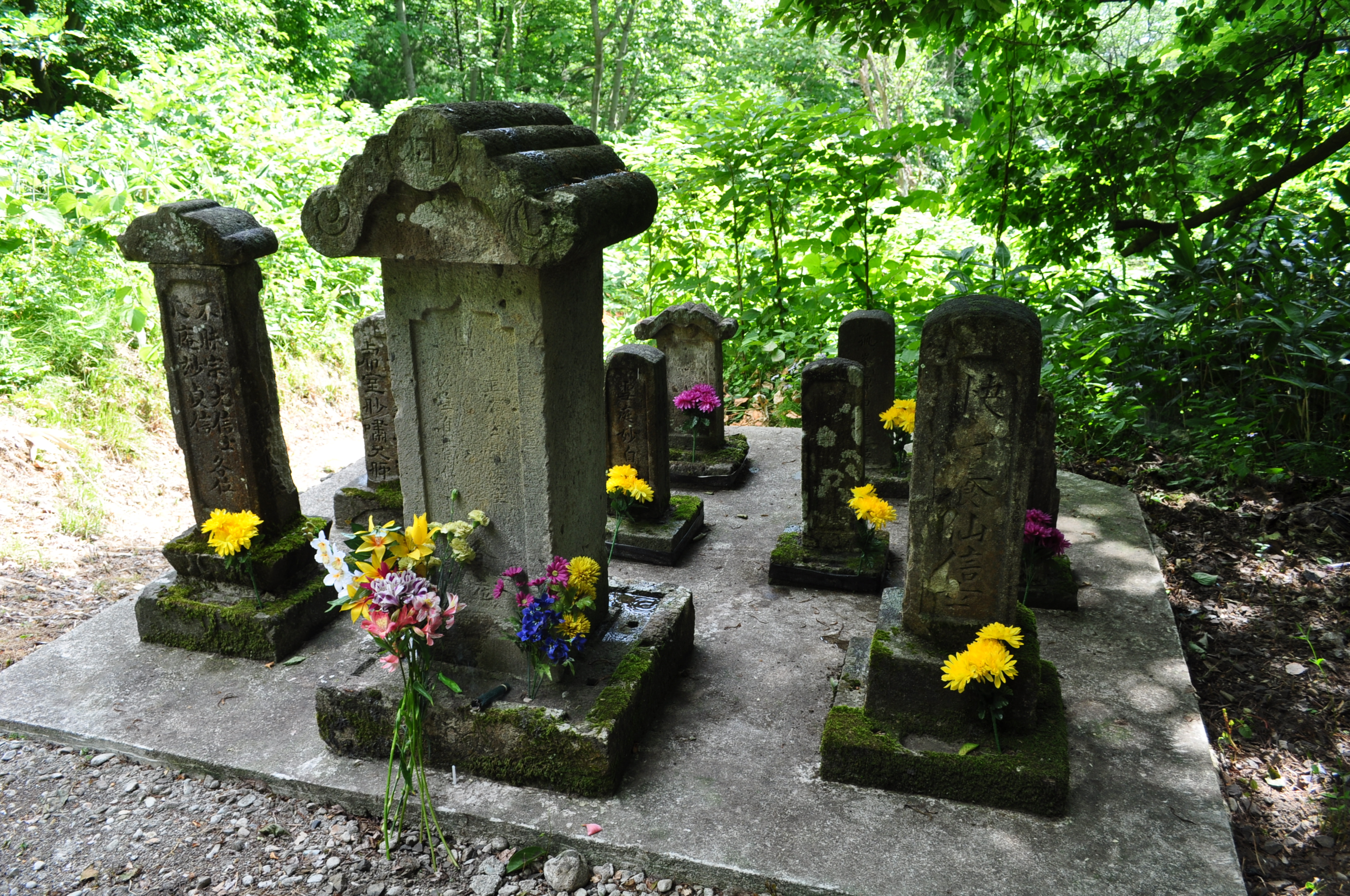 秋田市手形字大沢の旧正洞院にある樋口家代々の墓碑